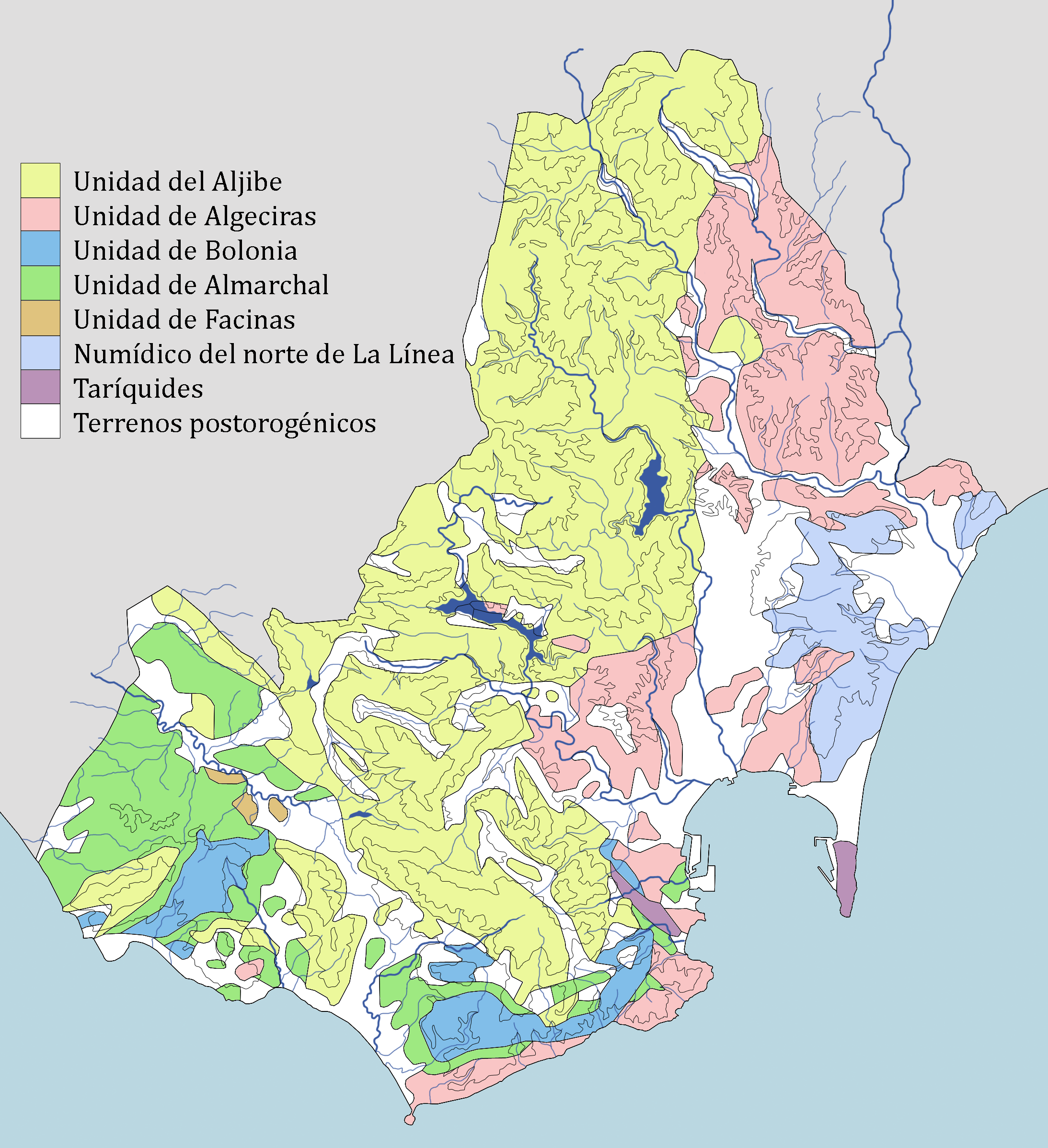 Mapa geológico del Campo de Gibraltar, Andalucía, España.